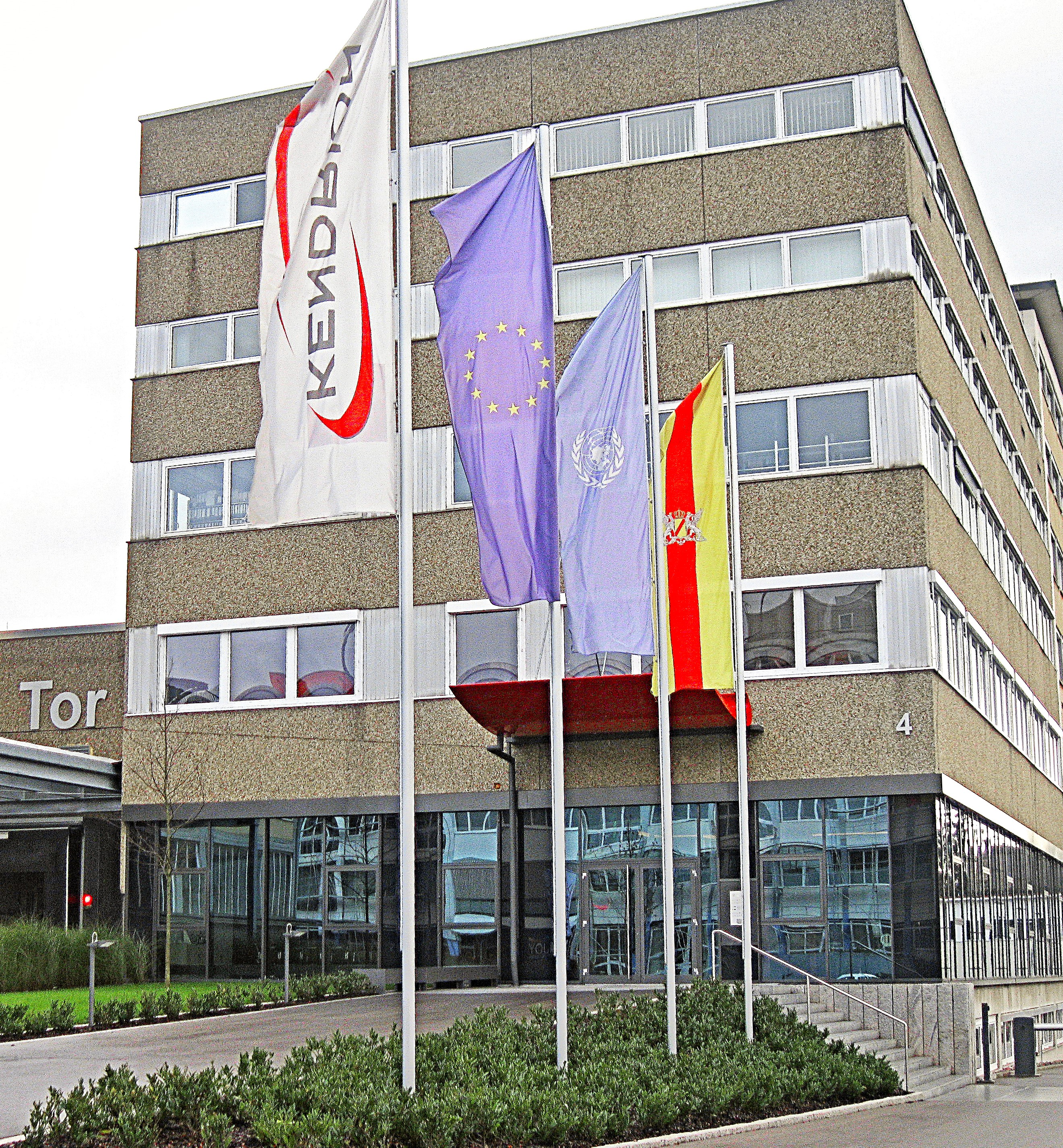 Kendrion Standort Villingen. Haupteingang